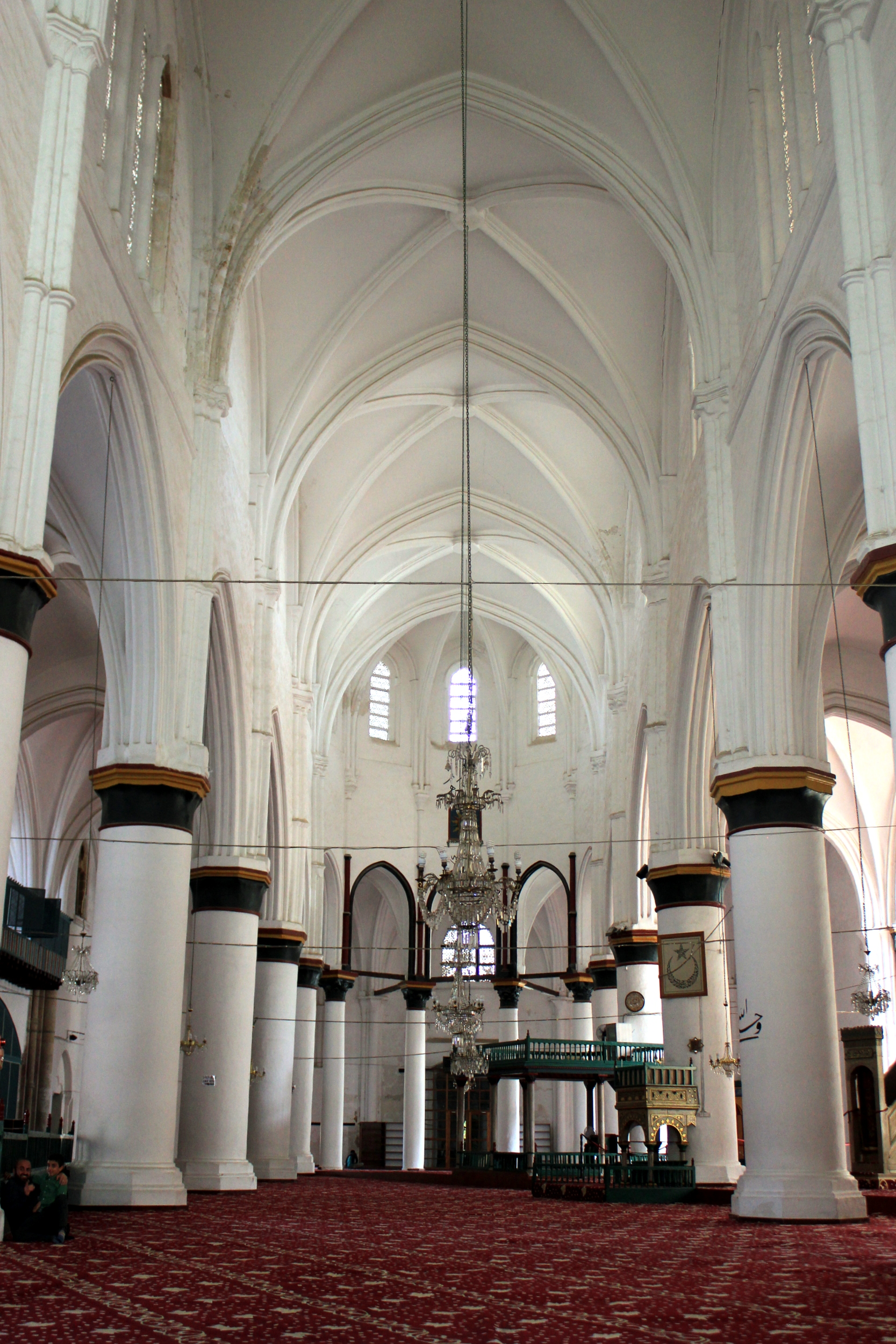 In der Selimiye-Moschee, der früheren Sophienkathedrale von Nikosia.